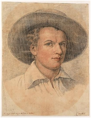 Zelfportret in rood krijt. Uit collectie Centraal Museum Utrecht.